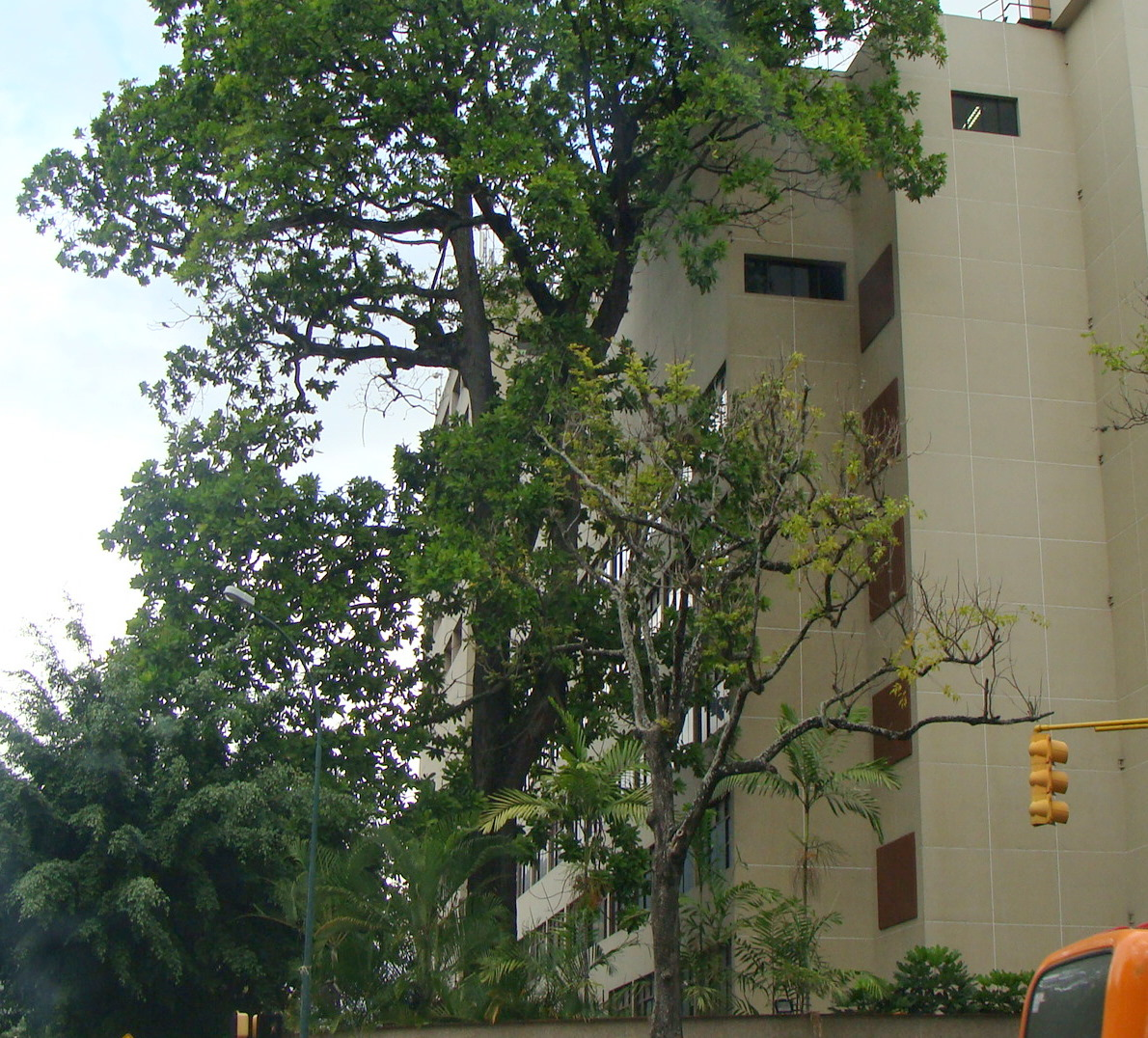 Un corpulento mijao junto a una clínica en la urbanización Altamira, en Caracas